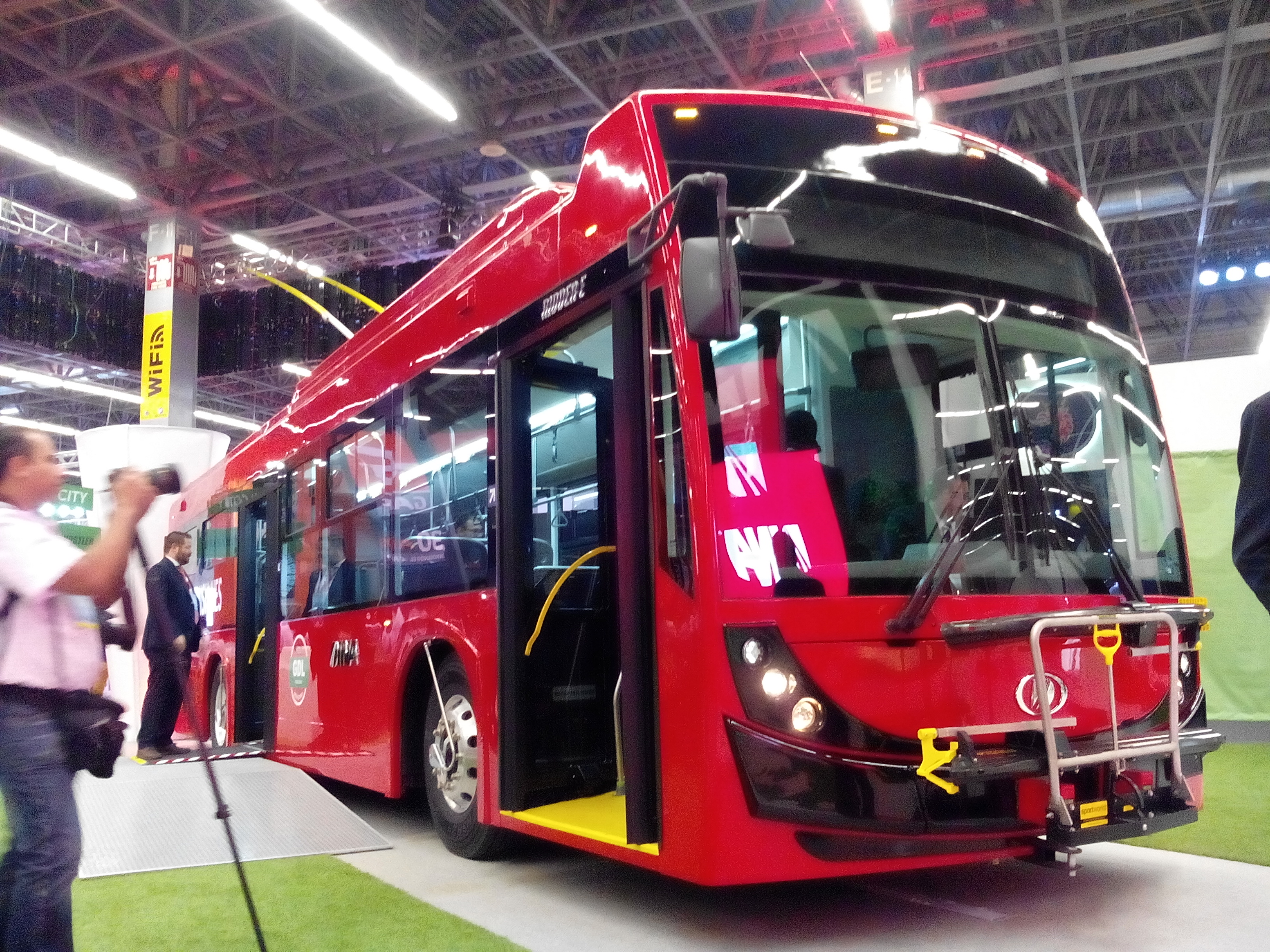 Trolebús que estuvo en pruebas en la ciudad de Guadalajara, México, exhibido en la Expo Transporte Anpact 2015 celebrada en la misma ciudad.